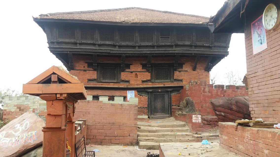 नेपाली: गोरखा दरवार